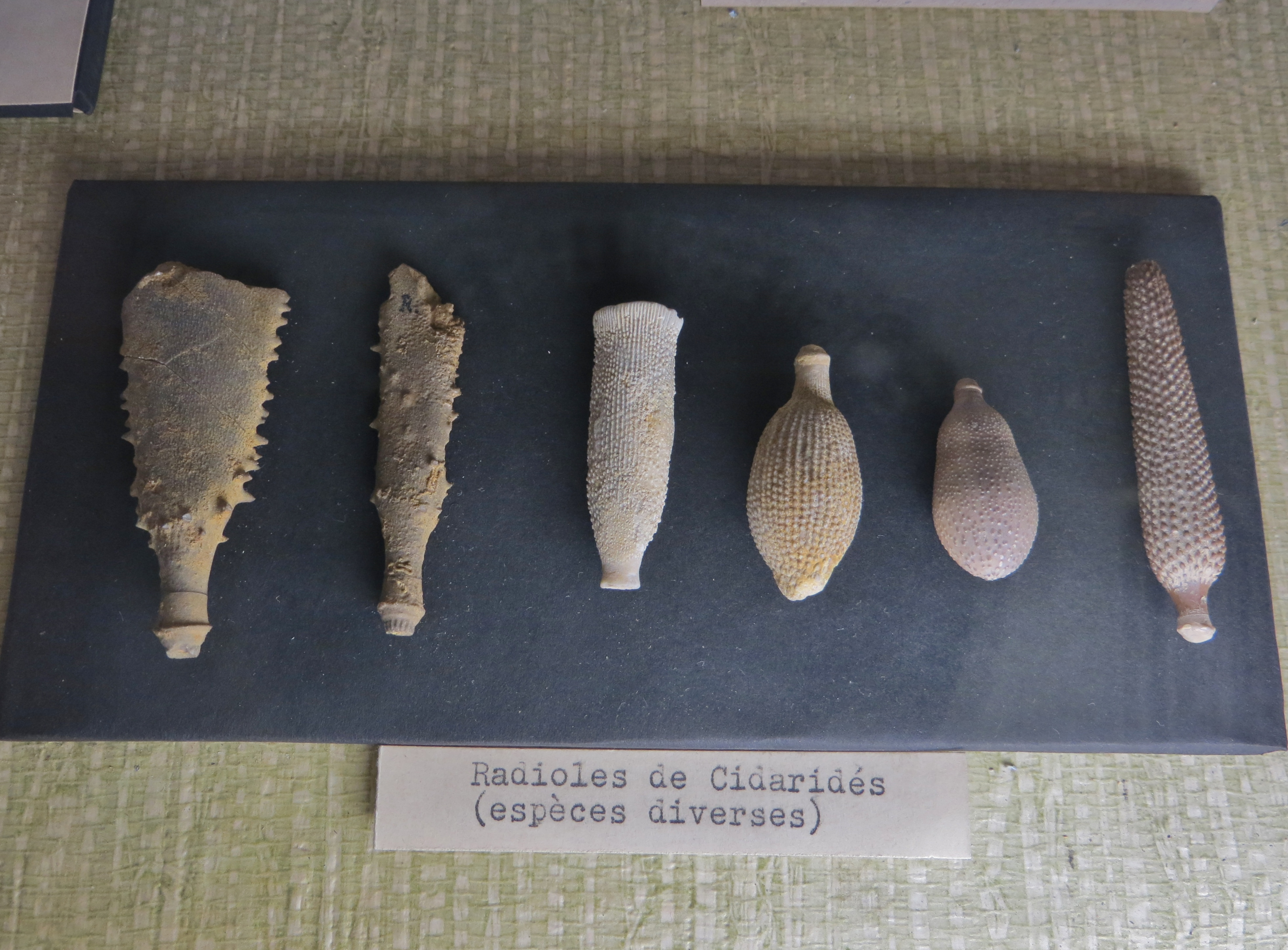 Radioles de Cidaridae (différentes espèces, MNHN).